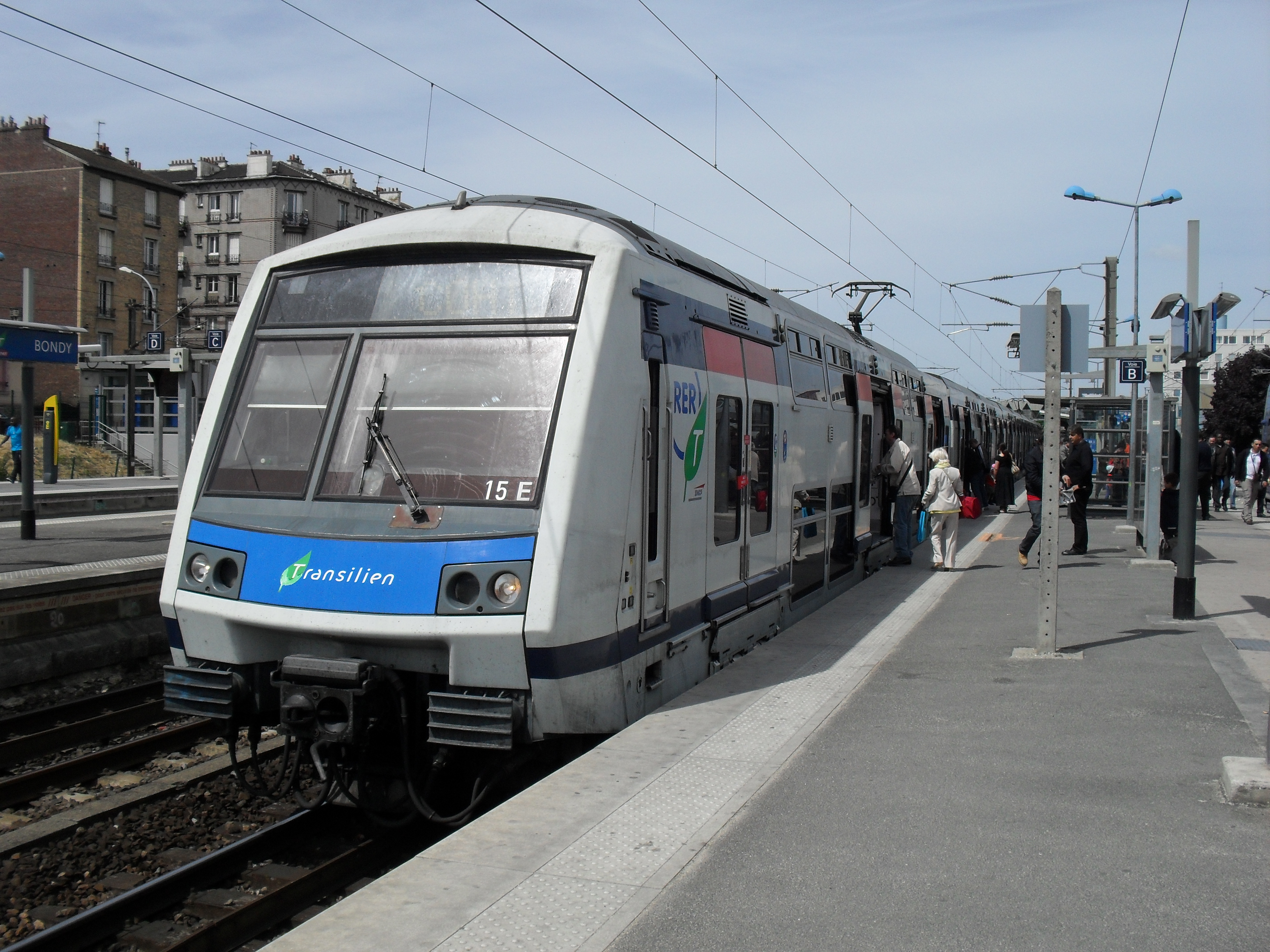 RER E - Gare de Bondy